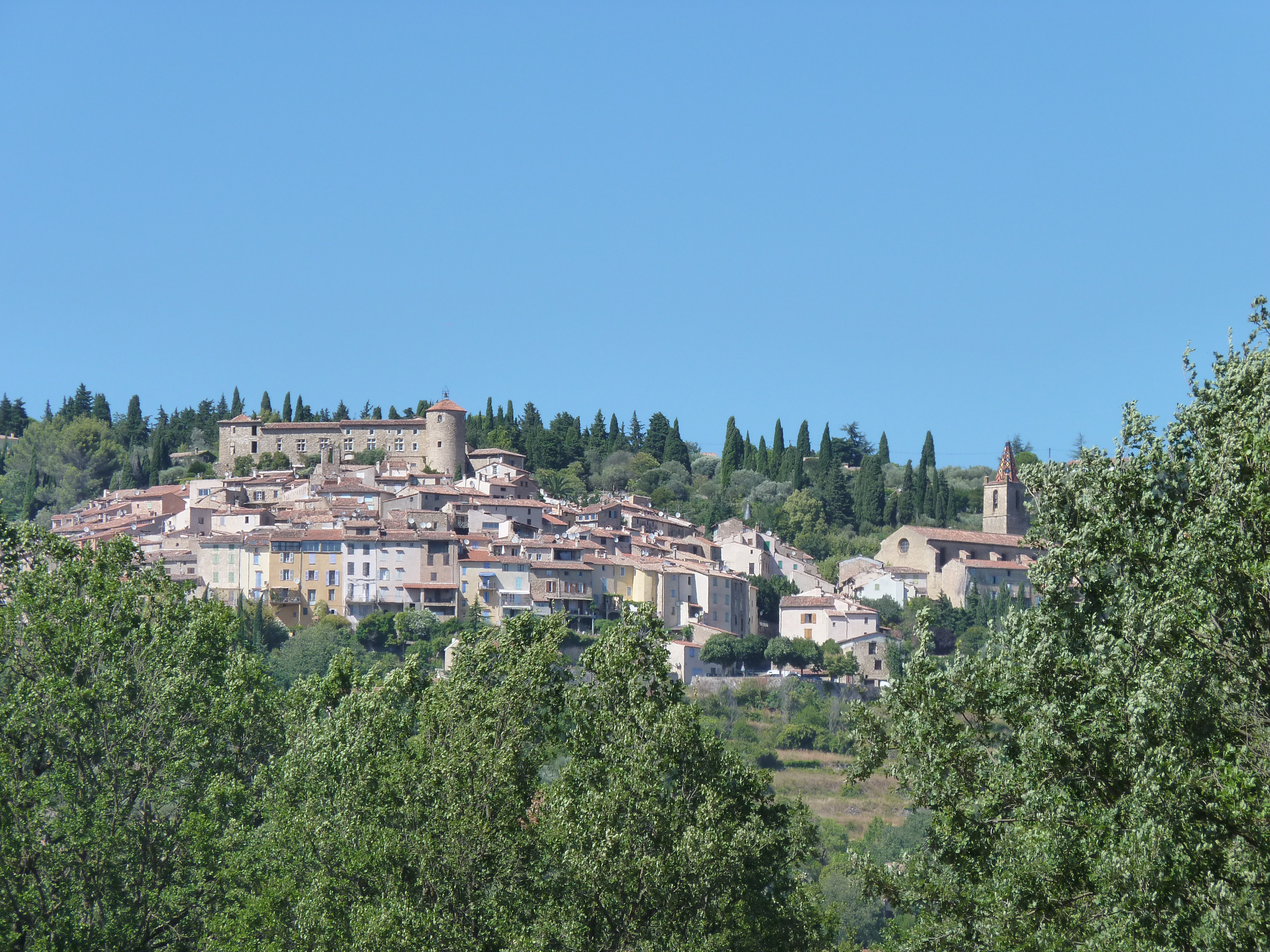 Vue de Callian